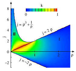 Die Euler-Poisson Gleichungen werden im Bobylev-Steklov Fall mit elliptischen Funktionen gelöst, die das elliptische Modul im Bild besitzen. ρ ist der Drehimpuls um die 3-Achse und j der um die vertikale Achse.